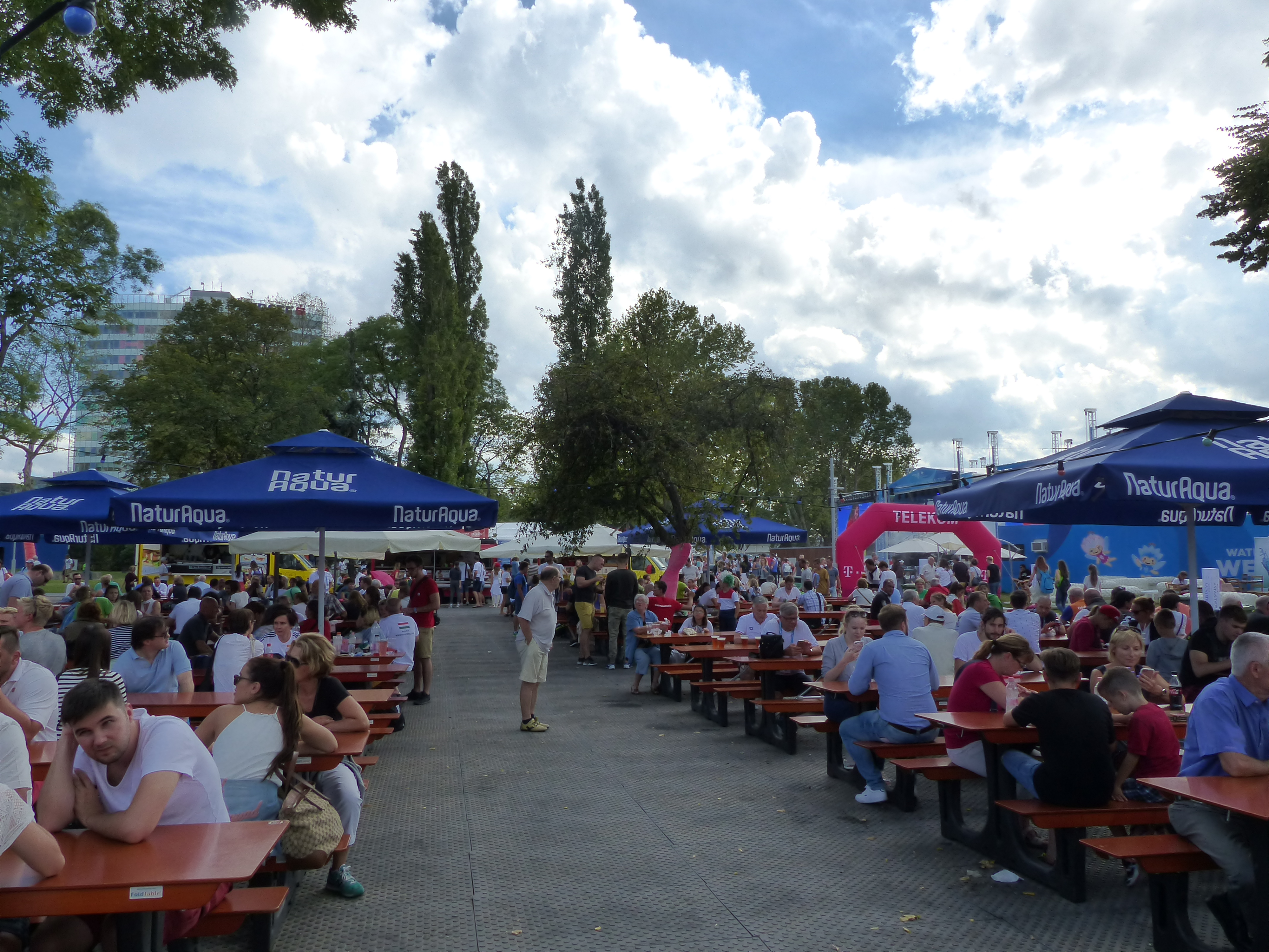 Dagály Szurkolói Zóna. A felvételek 2017. július 26-án, szerdán készültek a Dagály Szurkolói Zónában, Budapesten. 17. FINA úszó - világbajnokság (Budapest- Balatonfüred).